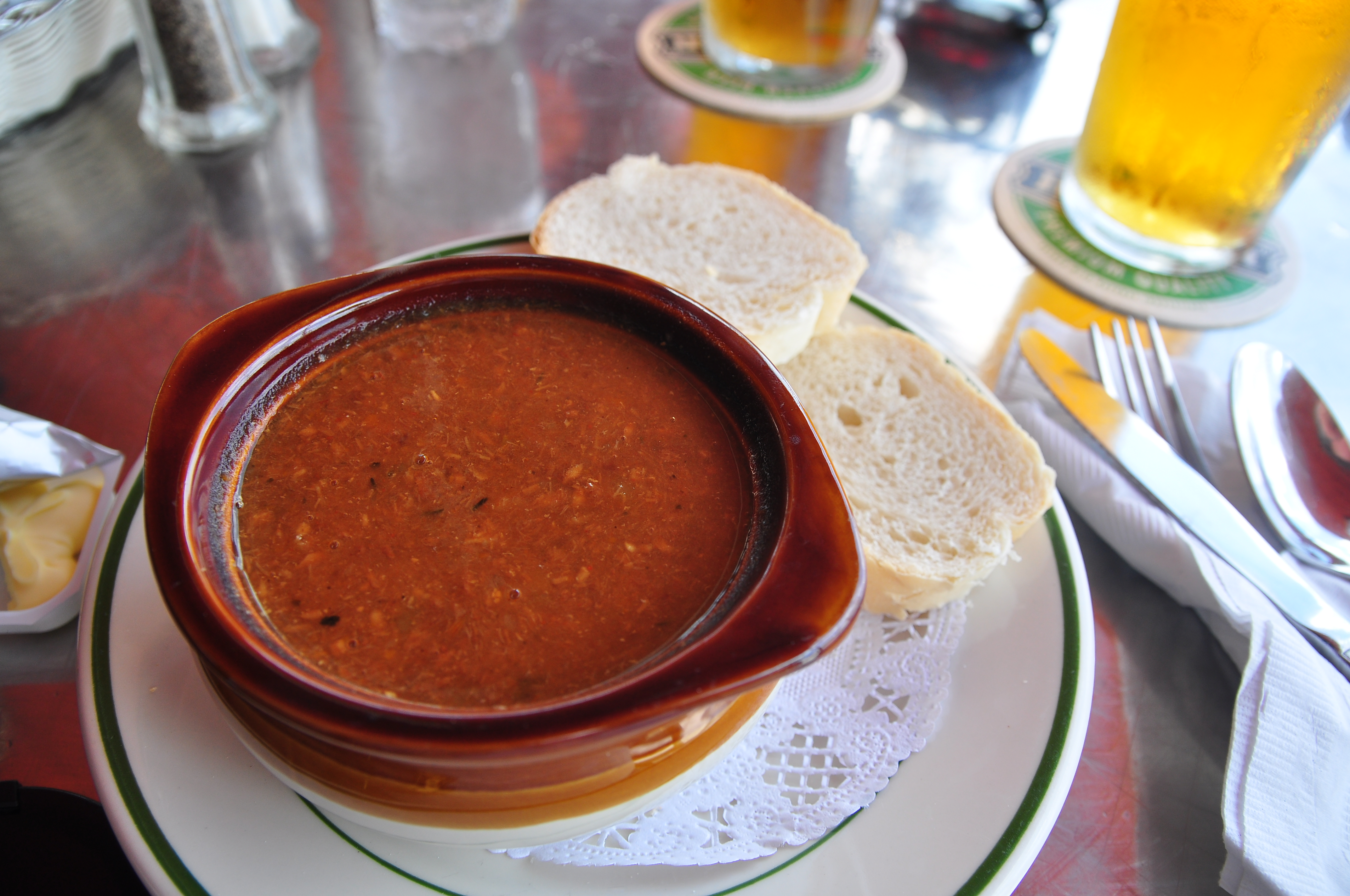 Lunch.